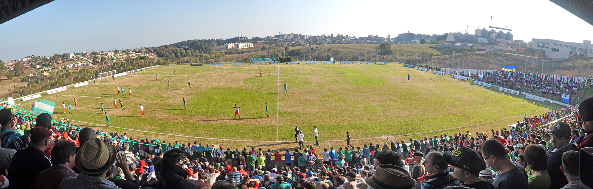 Gaúcho 1-2 Guarany-BA - Final do Campeonato Gaúcho - Segunda Divisão de 2016, BSBios Arena, Passo Fundo-RS